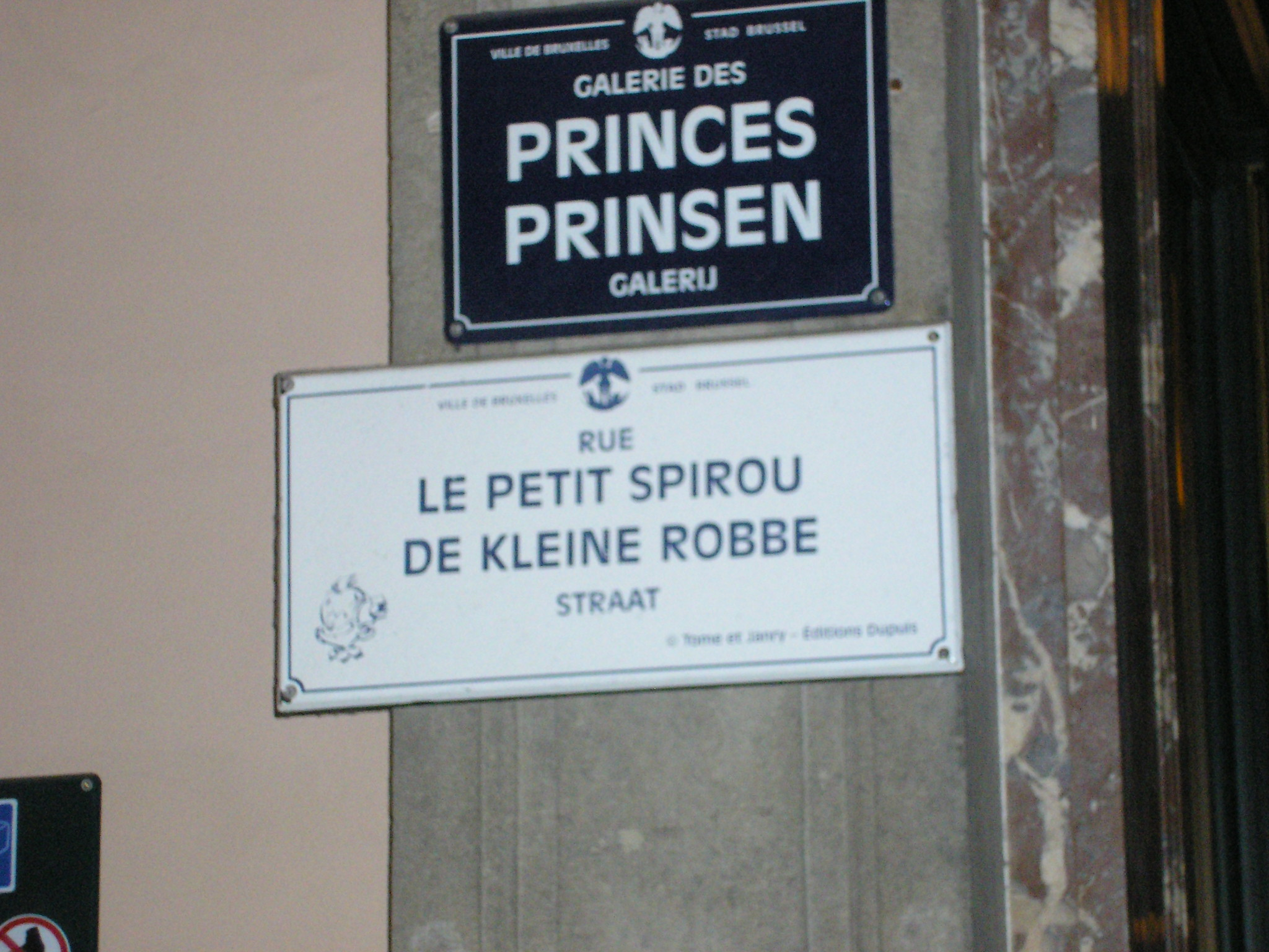 Zweisprachige Schilder in Brüssel (französisch/niederländisch): Galerie des Princes/Prinsen galerij und Rue Le Petit Spirou/De Kleine Robbe Straat